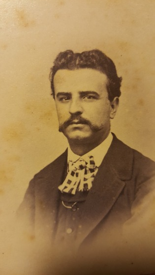 Andrés Llauradó y Fábregas en 1880